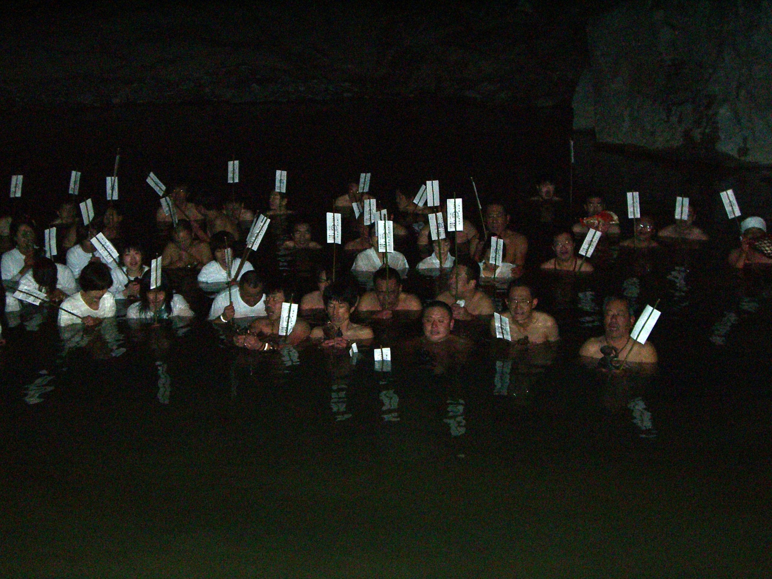 極楽寺の冬至水行